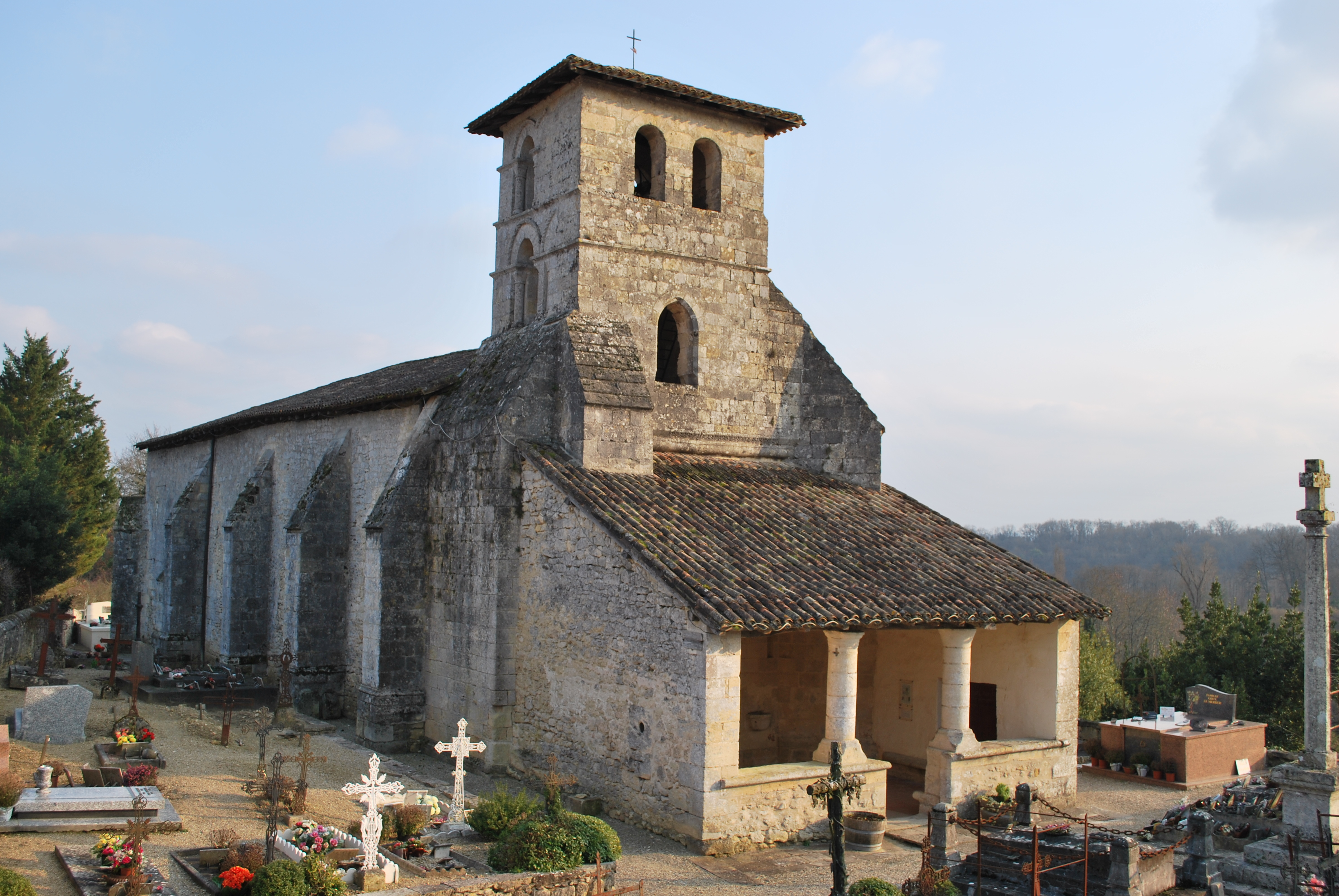 église de Saint-Aubin-de-Branne vue de la Place